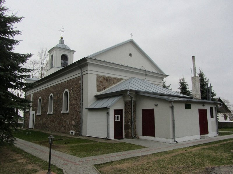 Крамяніца. Касцёл